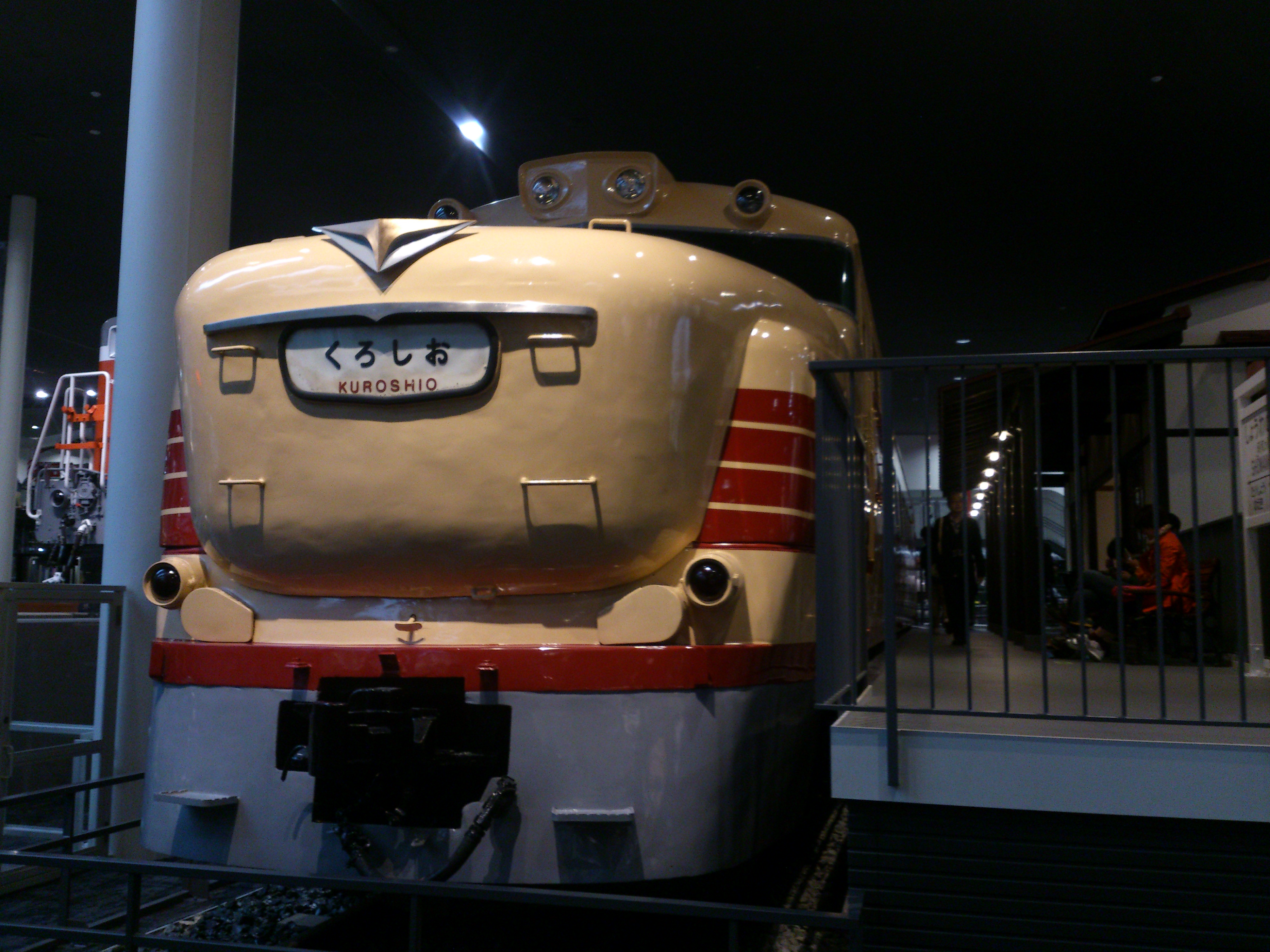 京都鉄道博物館